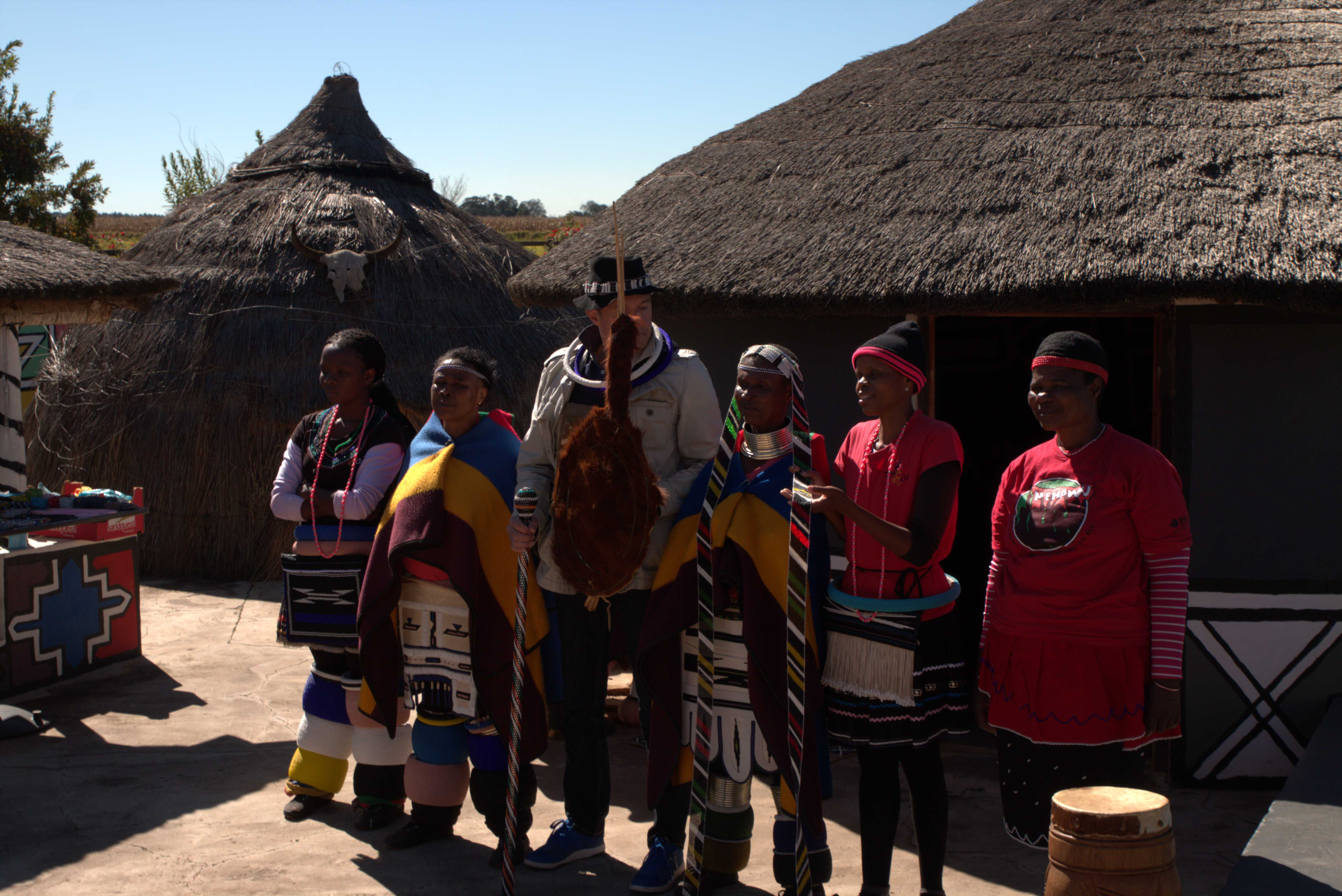 Grand-Chef Ndébélé (Cérémonie d'intronisation)